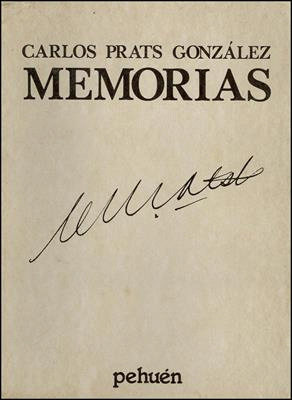 Memorias : Prats González, Carlos, 1915-1974